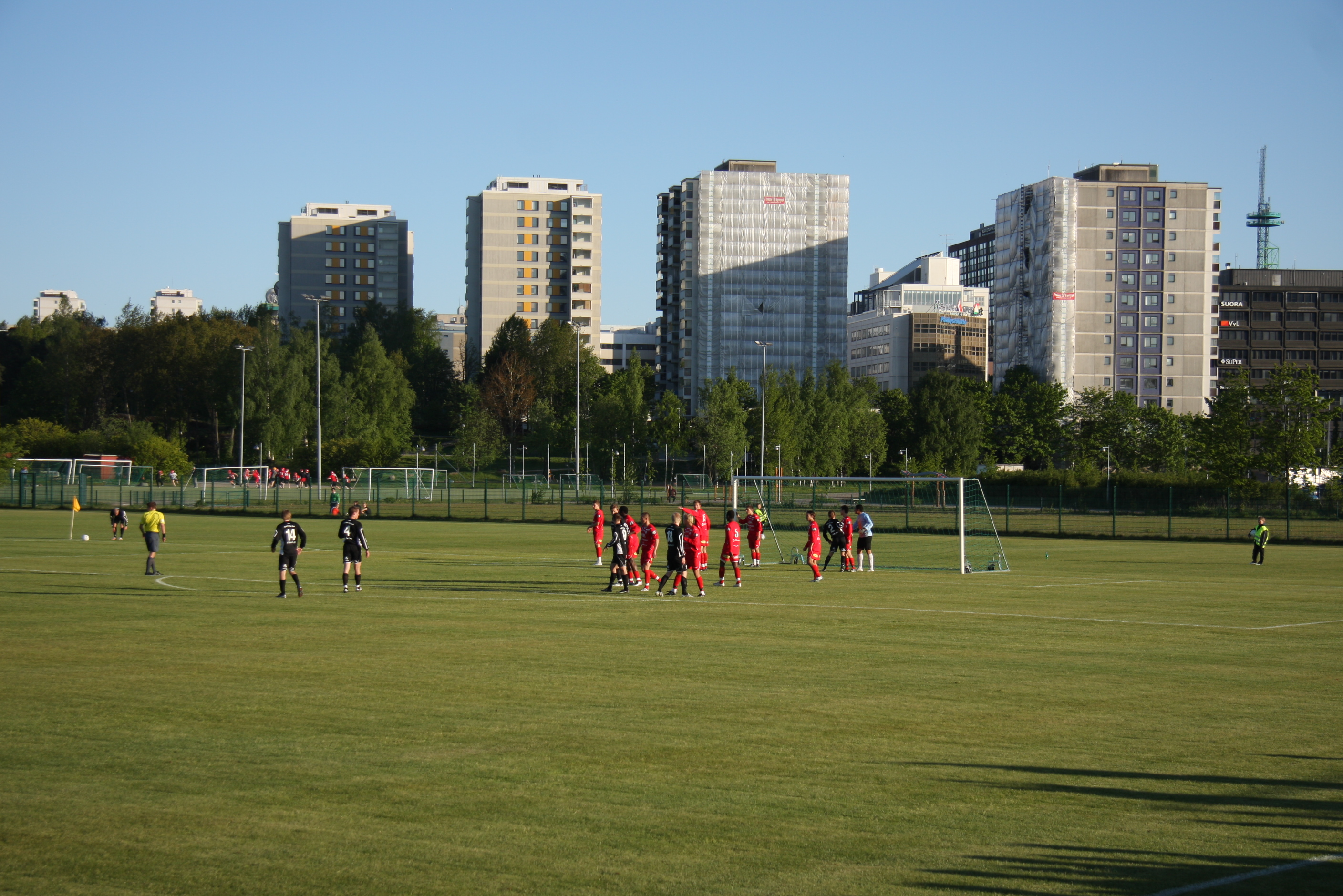 KäPa and TP-47 playing a 1.div football game in Käpylä, Helsinki, Finland.